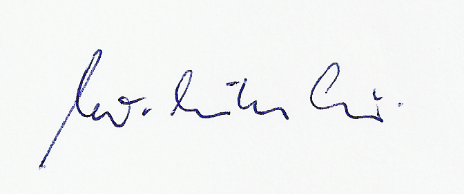 Signatur seines Briefes an mich vom 14.9.1993.